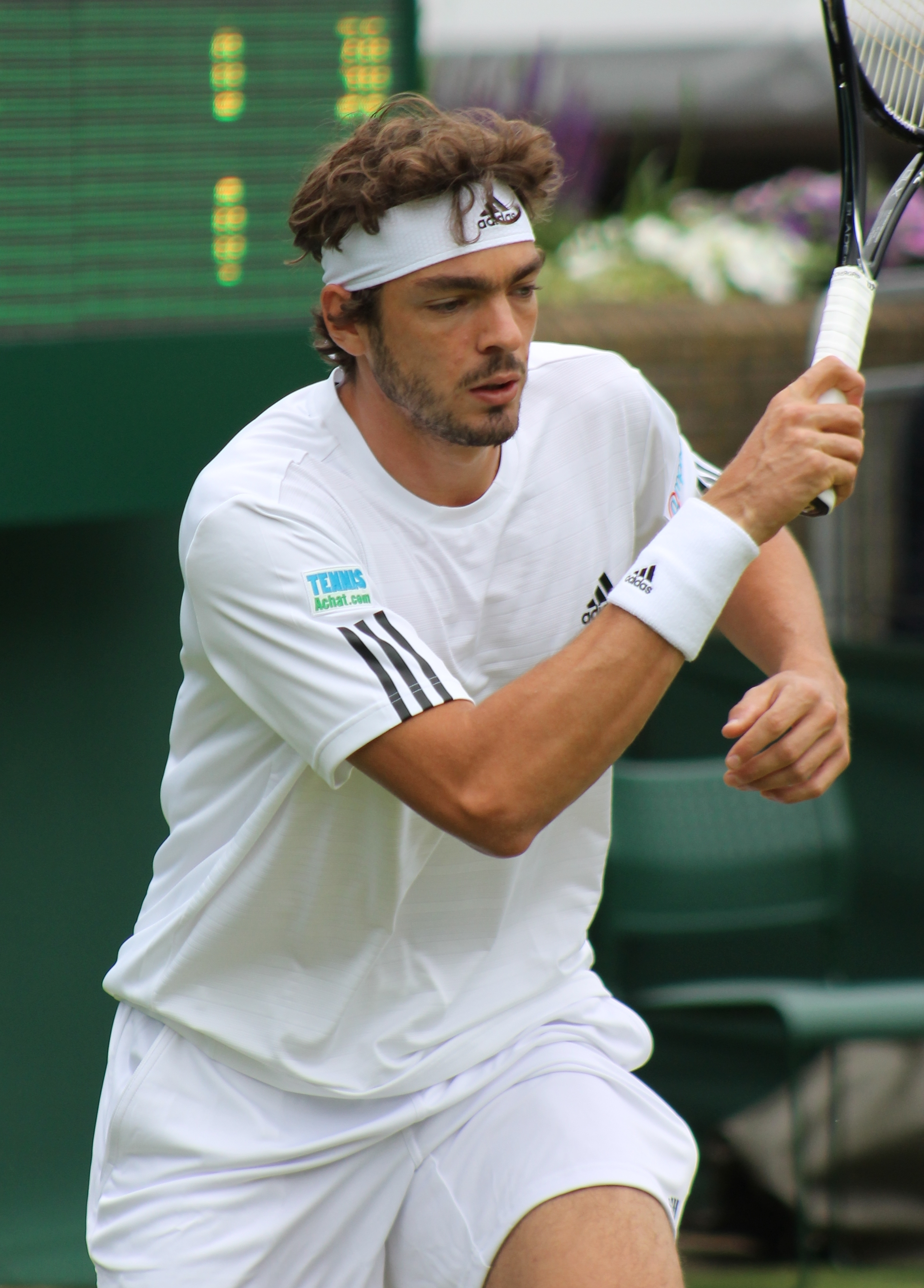 Rufin WM13-009